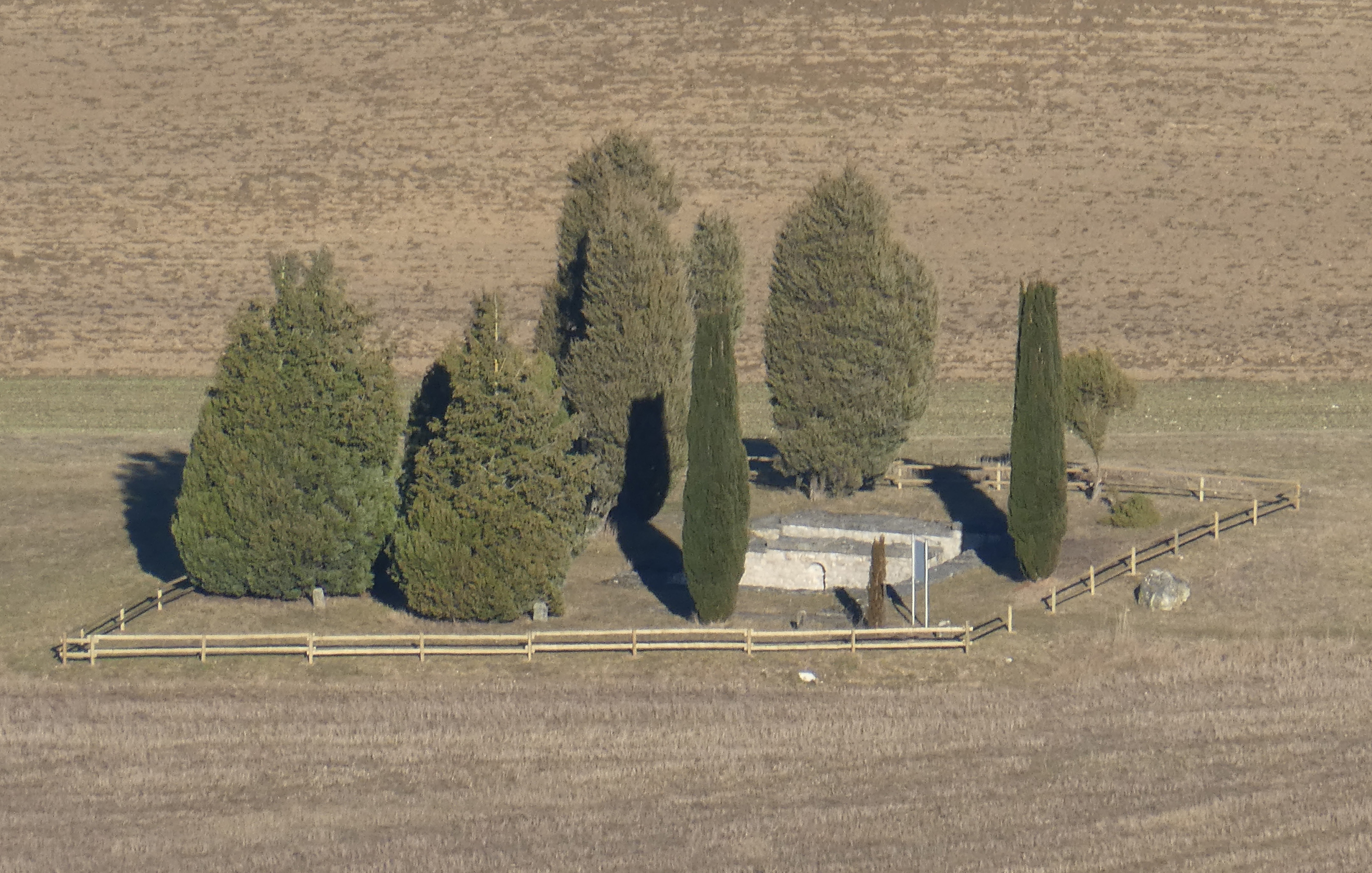 Oberkochen - Im Jahre 1971 ausgegrabener römischer Keller beim Wanderparkplatz nördlich von Oberkochen, wahrscheinlich Teil einer Raststätte an der Straße zwischen Heidenheim und Aalen aus der Zeit zwischen 150 und 200 n. Chr.